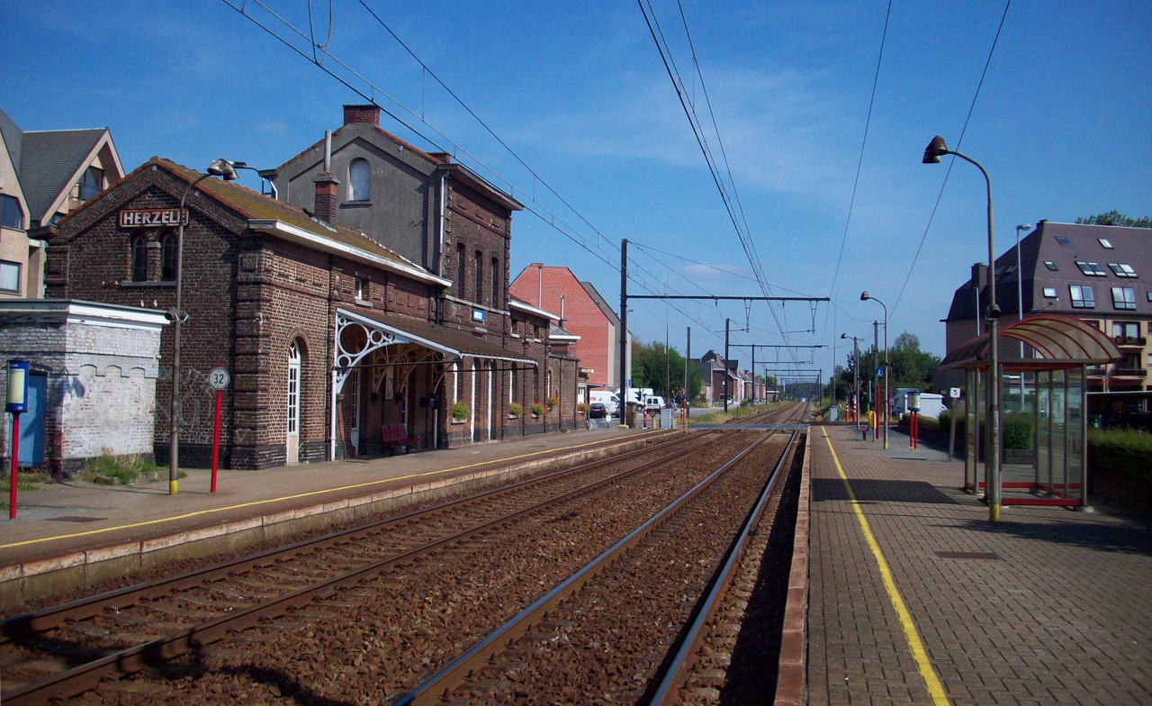 Station Herzele